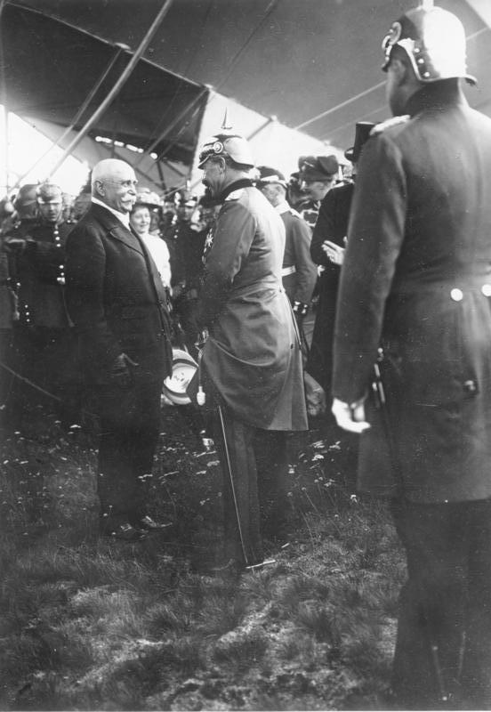 ADN/ZB/Archiv Deutschland: Kaiser Wilhelm II. von Deutschland begrüßt den Grafen Zeppelin nach dessen glücklicher Landung mit dem Luftschiff 1909 in Tegel bei Berlin. 14459-09